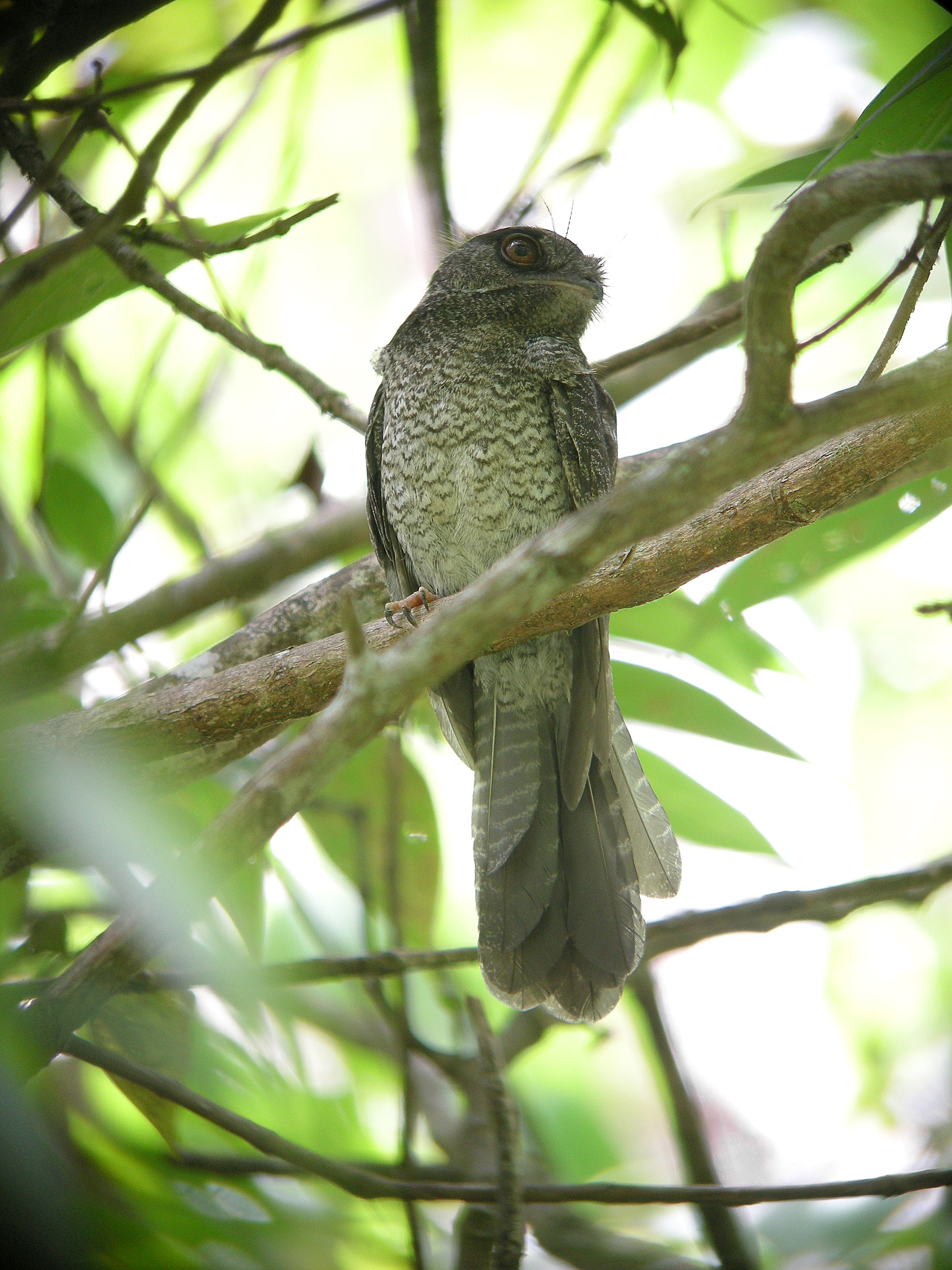 Barred Owlet-nightjar (Aegotheles bennettii)